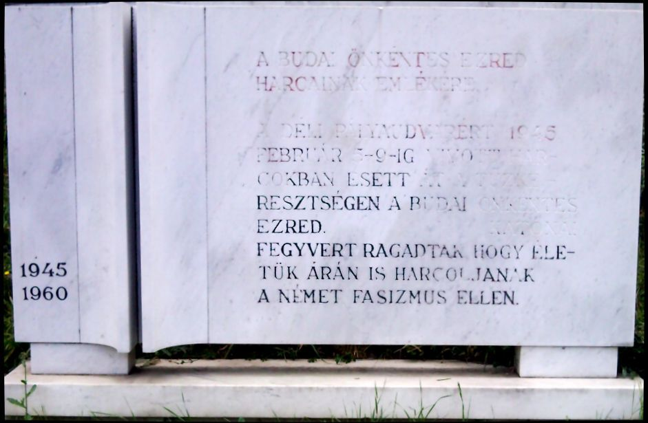 A Budai Önkéntes Ezred emlékműve (Felállítás 1977, ifj. Szabó Zoltán). Budapest I. kerület, Krisztina krt. 37/a (Déli pályaudvar kerengő).